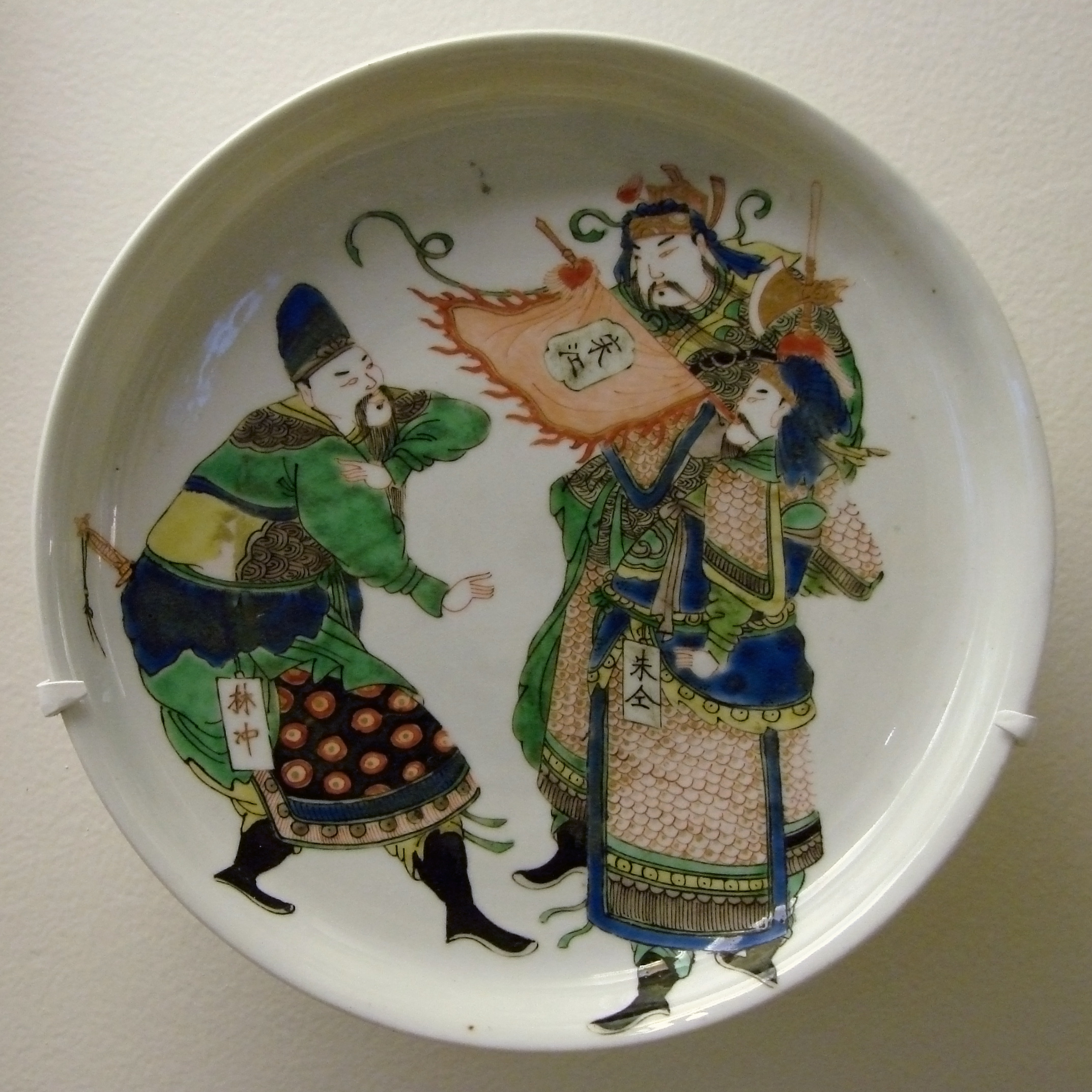 Plat représentant trois héros du roman Au bord de l'eau, écrit sous les Ming: Song Jiang, Lin Chong et Zhu Quan. Dynastie Qing, période Kangxi (1662-1722), 18ème siècle. Musée Guimet, Paris.